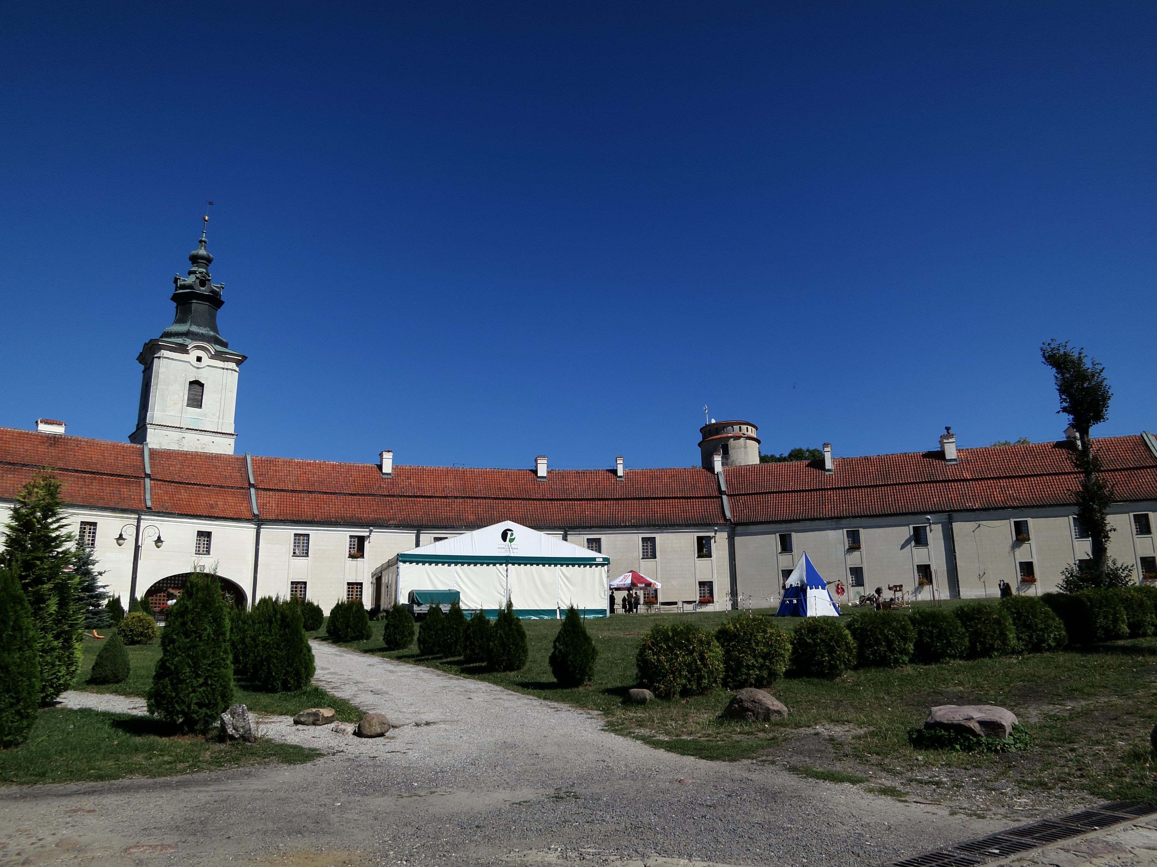 Sulejów, zespół klasztorny cystersów, XII, XIV, XVIII